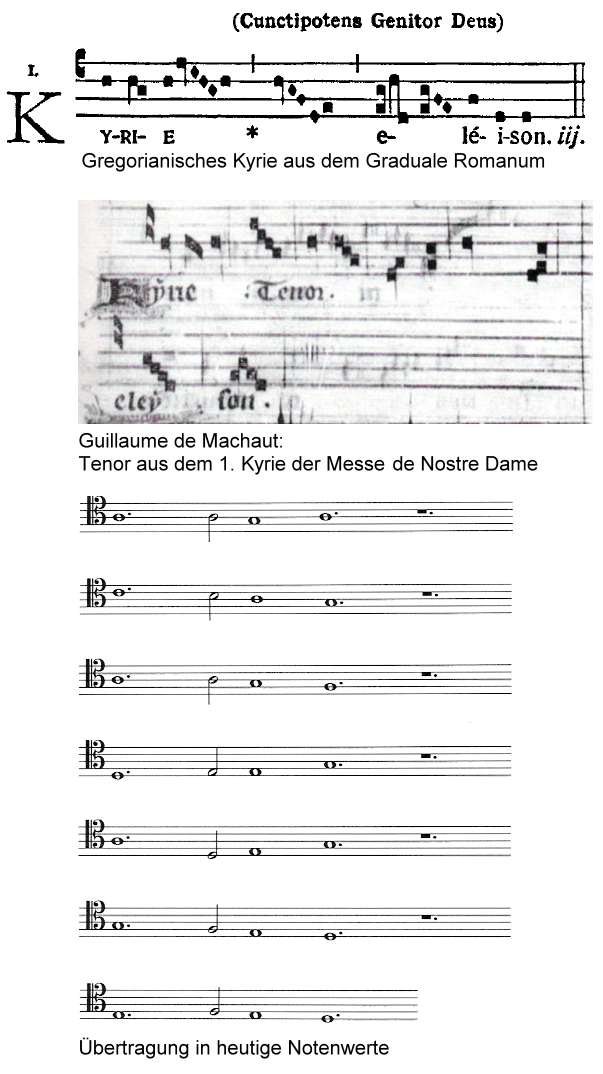 Vergleich des Gregorianisches Kyrie Cunctipotens Genitor Deus mit dem isorhythmischen Tenor aus dem 1. Kyrie von Guillaume de Machauts Messe de Nostre Dame und einer Übertragung in heutige Notation.